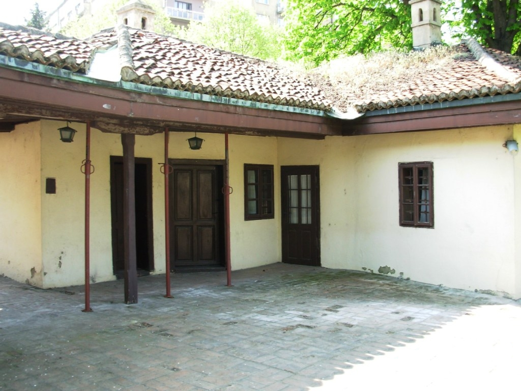 Вуков и Доситејев музеј дворишни део зграде у којој је био Харем. Београд. Сликао Голдфингер